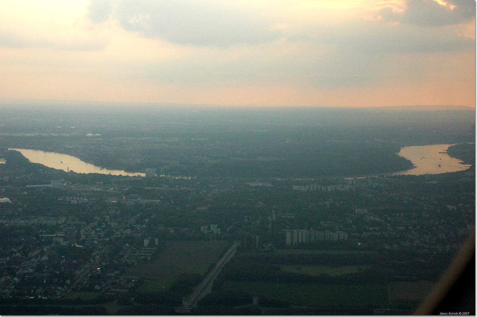 Köln 627